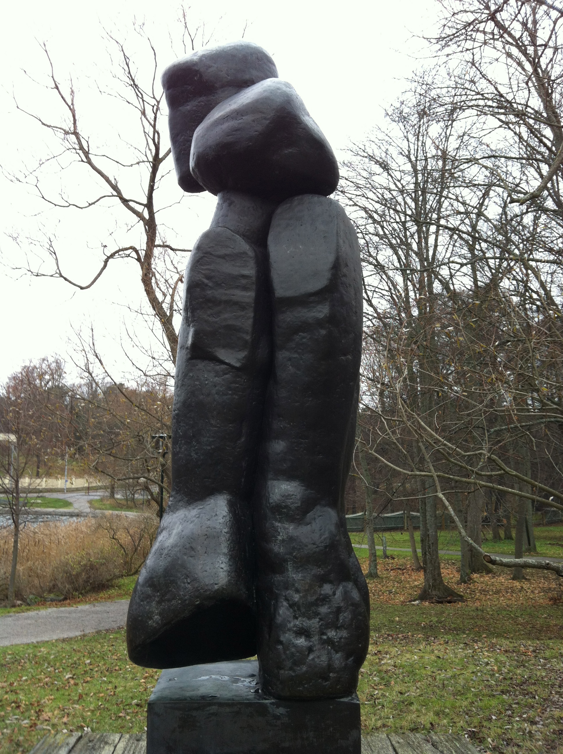 Skulptur på Valdemarsudde utförd av konstnären Liss Eriksson